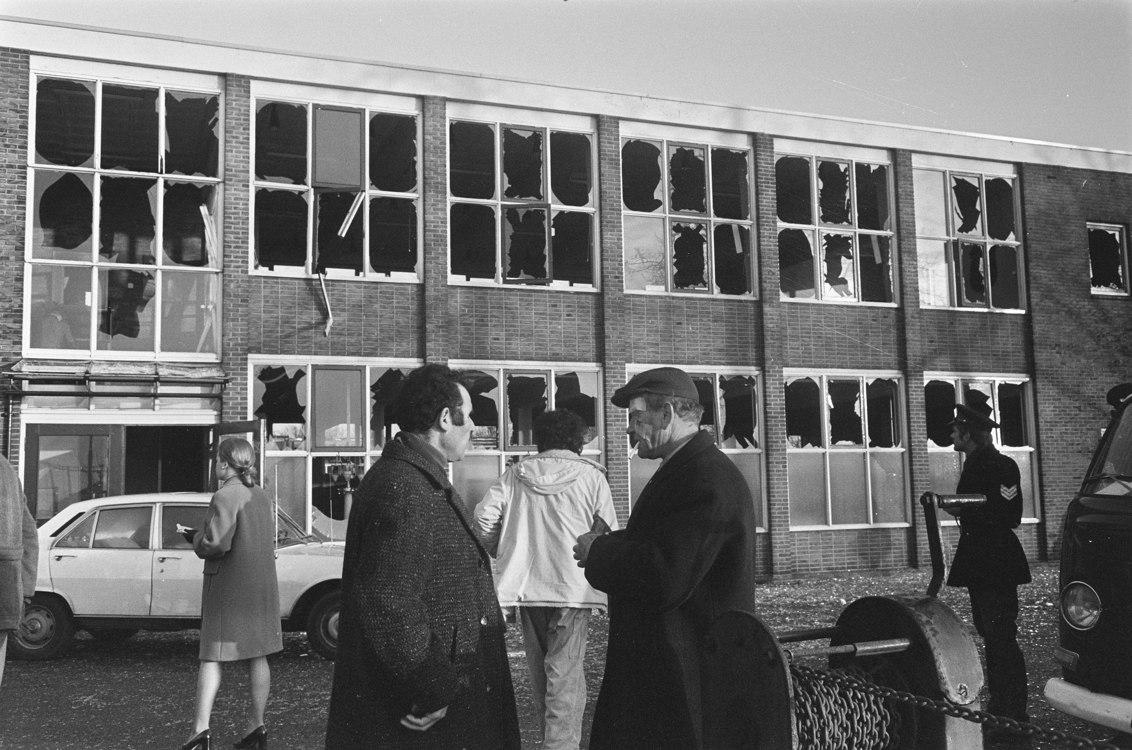 Collectie / Archief : Fotocollectie Anefo Reportage / Serie : [ onbekend ] Beschrijving : Ontploffing in Kruitfabriek te Muiden, werknemers voor gedeelte van fabriek waarvan alle ruiten kapot zijn Datum : 8 december 1972 Locatie : Muiden Trefwoorden : ontploffingen Fotograaf : Verhoeff, Bert / Anefo Auteursrechthebbende : Nationaal Archief Materiaalsoort : Negatief (zwart/wit) Nummer archiefinventaris : bekijk toegang 2.24.01.05 Bestanddeelnummer : 926-0861